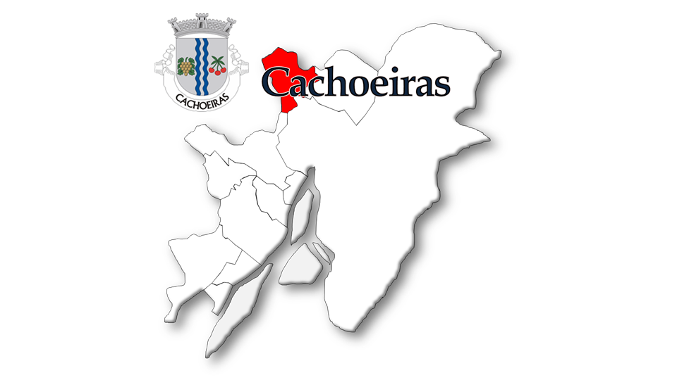 Evolução da População